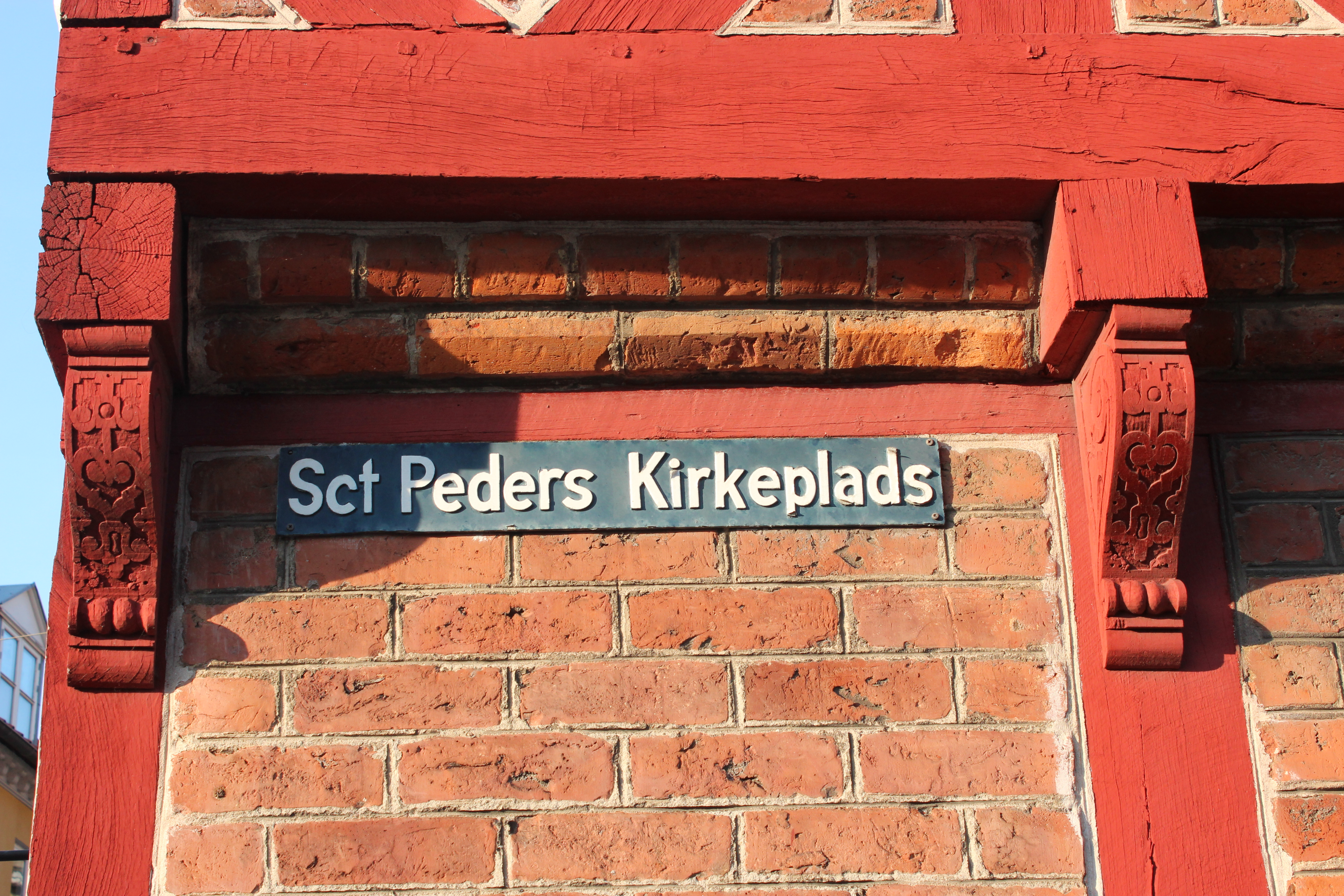 Oberst Schwanes Gård i Kirkepladsen 3 i Næstved. Opført i 1606. Udskårne knægte mellem de to etager.